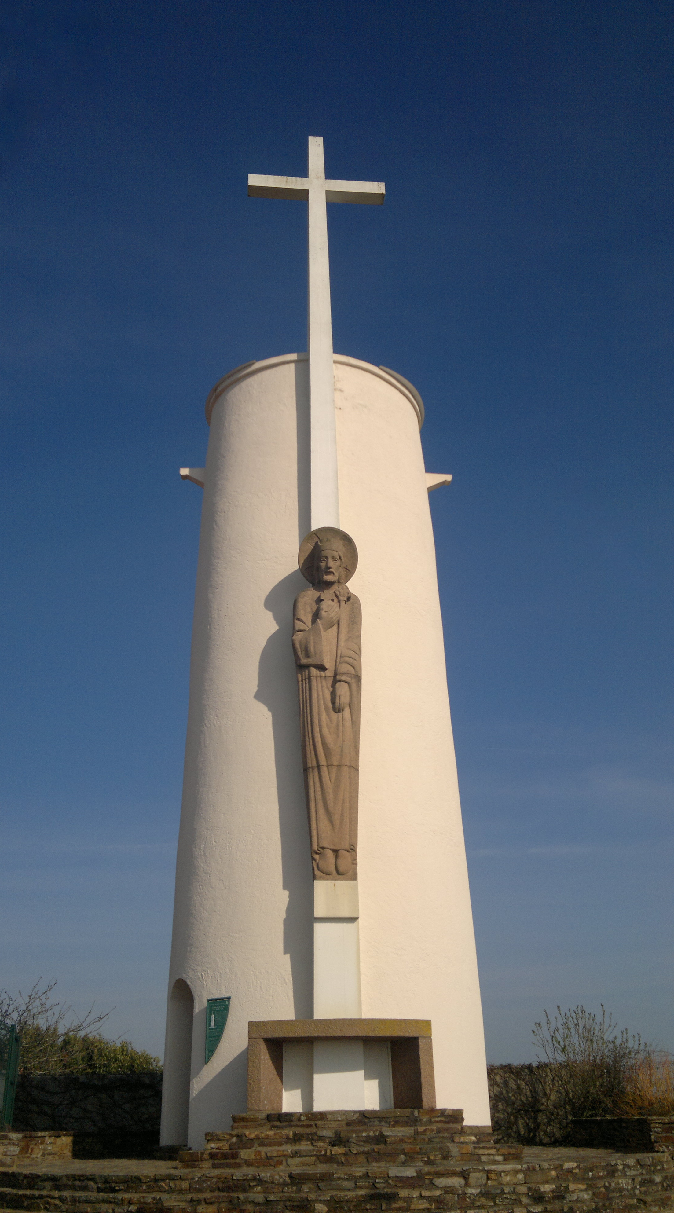 Moulin du Pé (XIX°), Fr-44-Loroux-Bottereau.